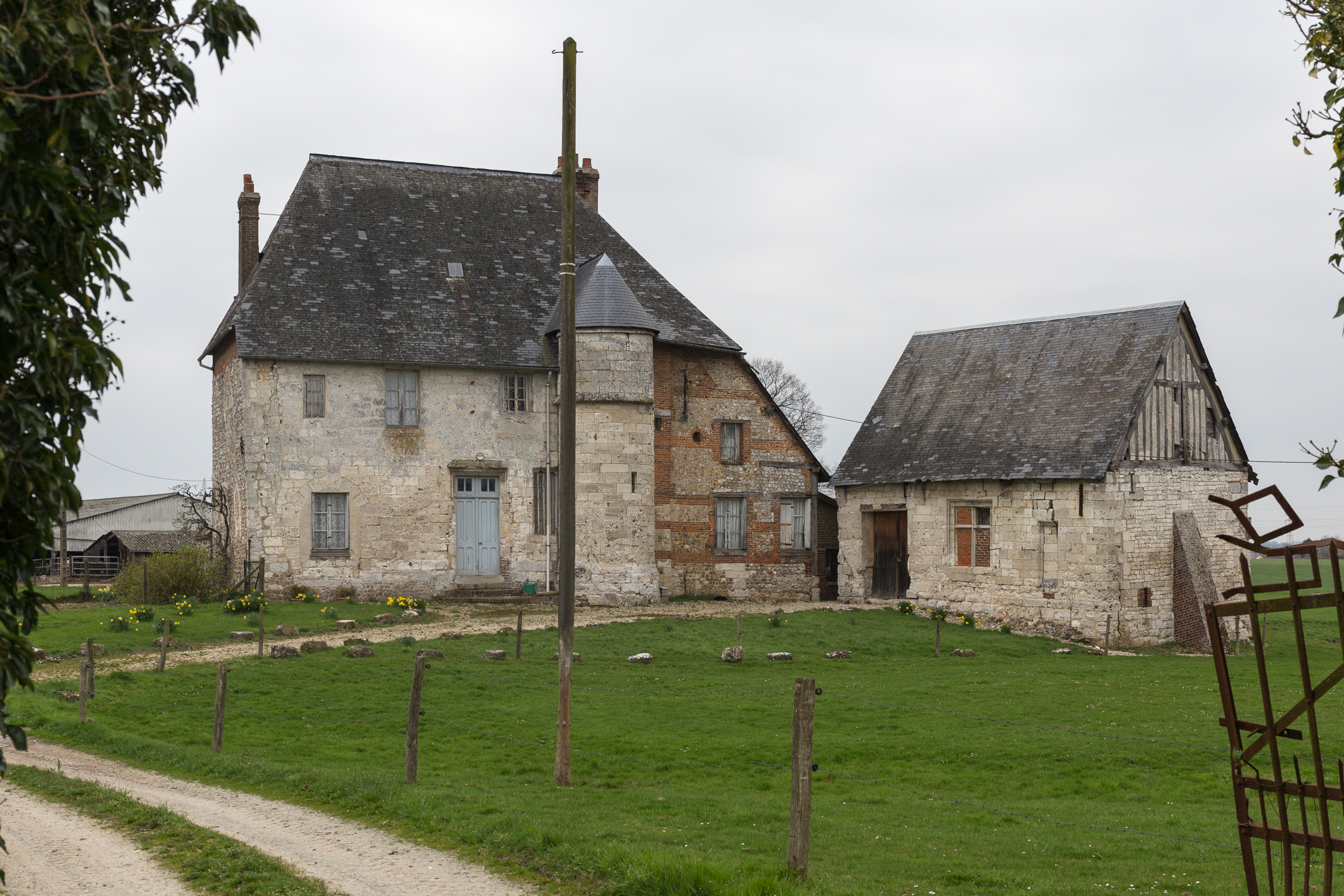 Manoir du XVe siècle, situé 316 route de l'Église à Anquetierville.